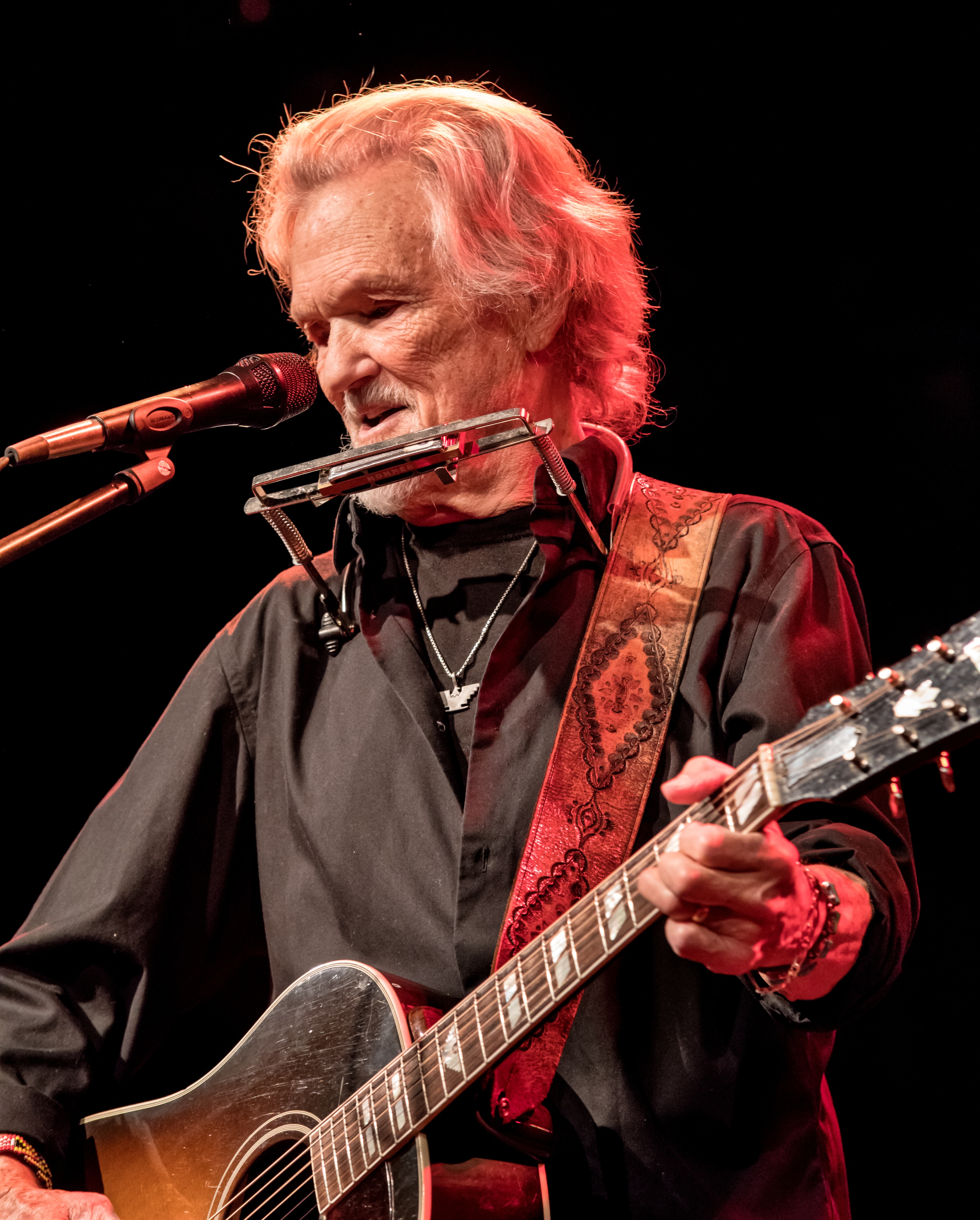 Bilder vom Zelt Musik Festival 2017 in Freiburg im Breisgau Kris Kristofferson